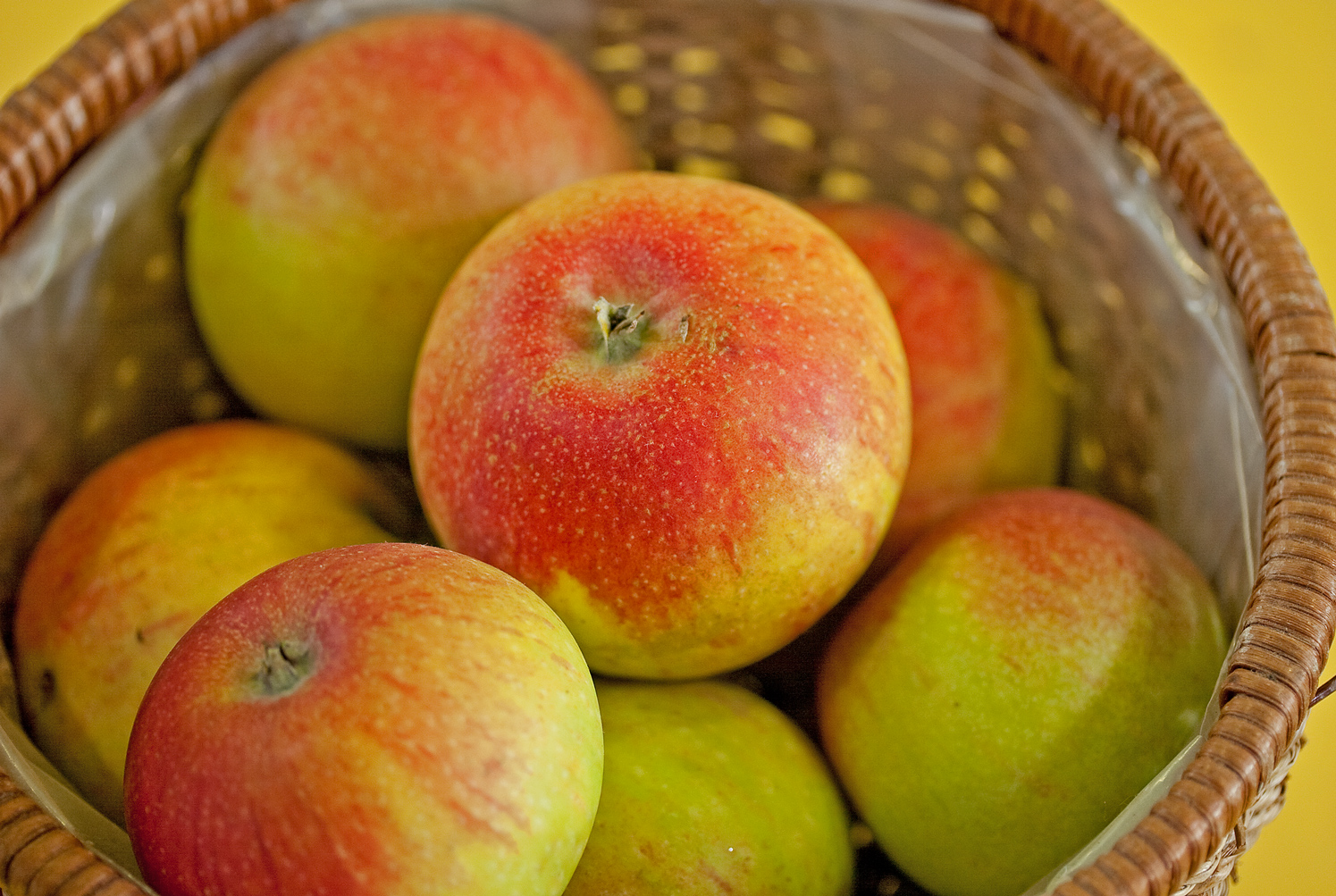 Alkmene ist eine Sorte des Apfels (Malus domestica), die eine Kreuzung aus 'Cox Orangenrenette' und 'Geheimrat Dr. Oldenburg' darstellt. Sie ist 1930 am Institut für Acker- und Pflanzenbau in Müncheberg gezogen worden.